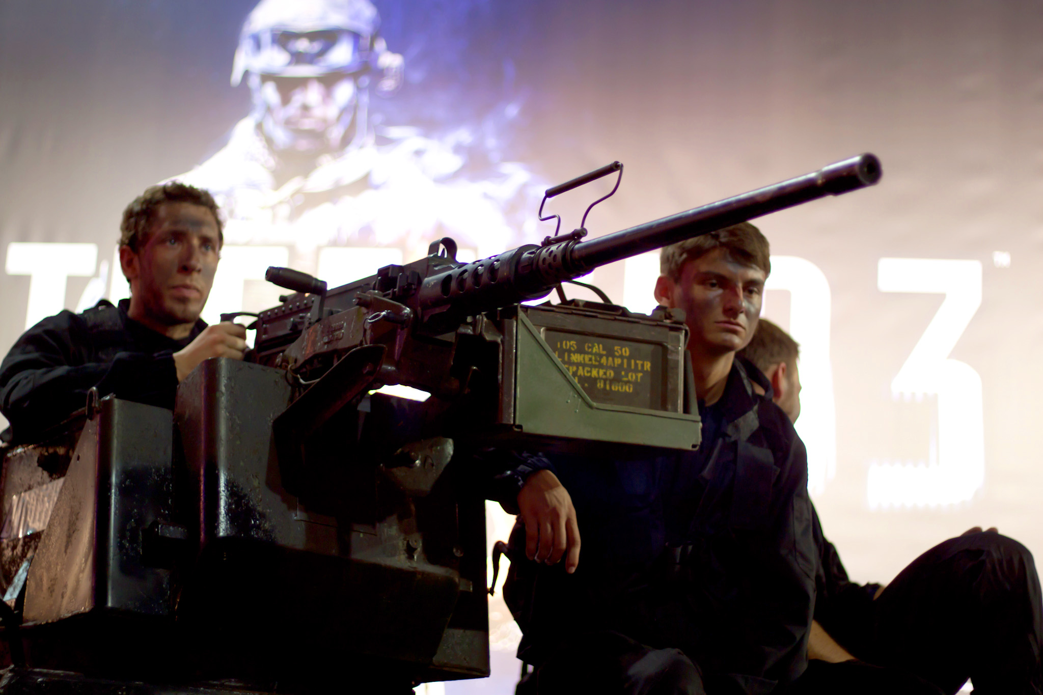 Paris Games Week 2011 at Parc des expositions de la porte de Versailles.